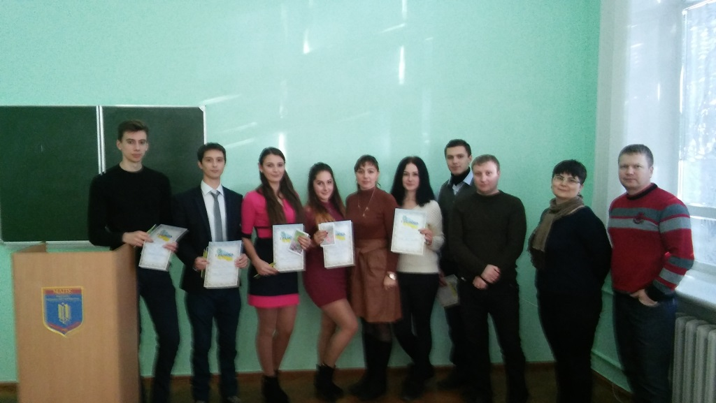 Учасники університетського конкурсу ім. Тоцький І.Н. Факультет інформатики ,математики ,економіки